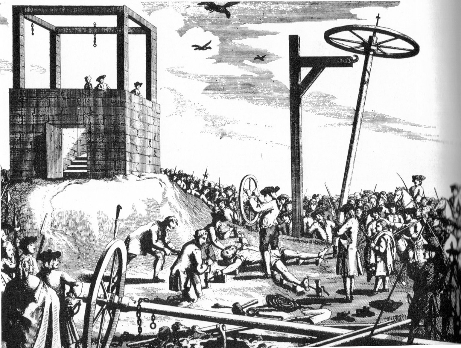 Das Hochgericht auf dem Galgenfeld, heute Bahnhofsviertel in Frankfurt am Main. Darstellung einer Hinrichtung durch das Rad, 1741.